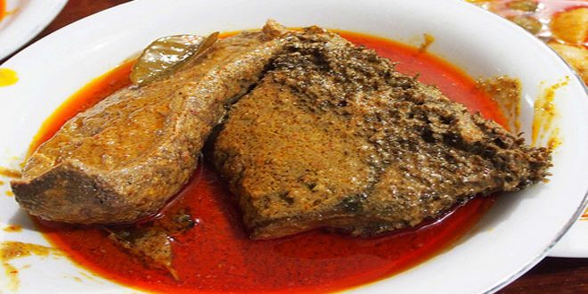 makanan Minangkabau